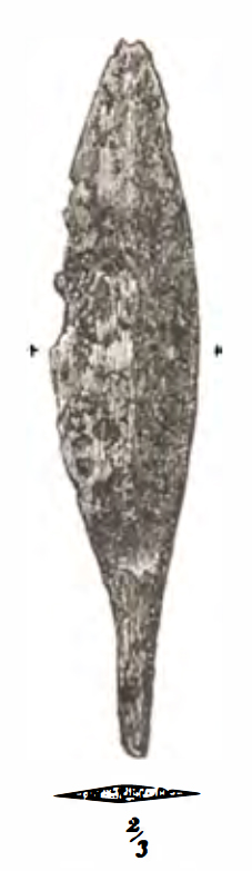 Hjalmar Appelgrenin piirrustus Repolan linnavuorelta löydetystä keihäänkärjestä